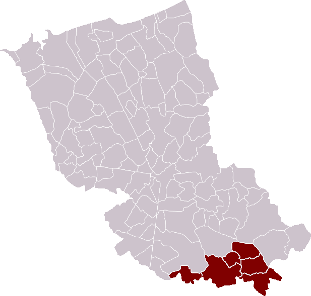 Locatie Kanton Meregem in het arrondissement Duinkerke, Frankrijk - zelfgemaakt Location Canton of Merville in the Dunkirk district, France - self made Localisation Canton de Merville dans l'arrondissement de Dunkerque, France - fait moi-même